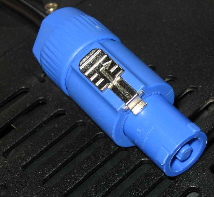 PowerCon Stecker und spannungsführend, daher blau. Wackernheim, den 25.08.2005